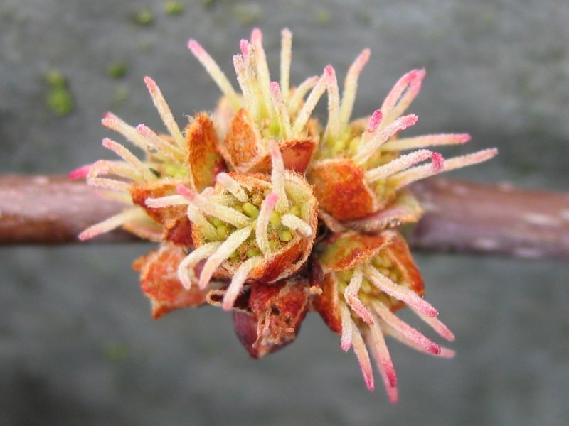 Blüte des Silber-Ahorns Acer saccharinum